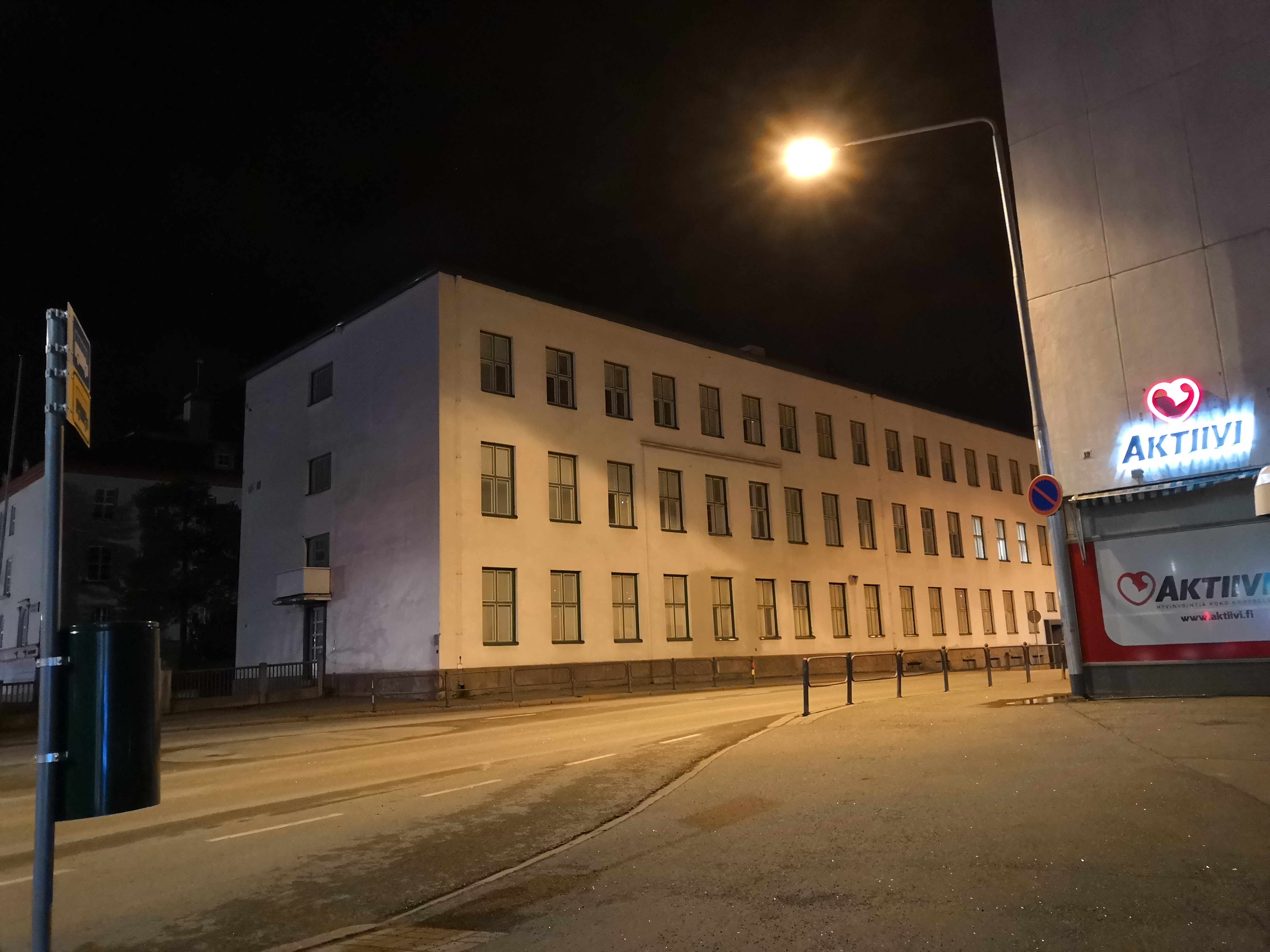 Kouvolan Kankaan koulun valkoinen rakennus eli Oppikujan koulu